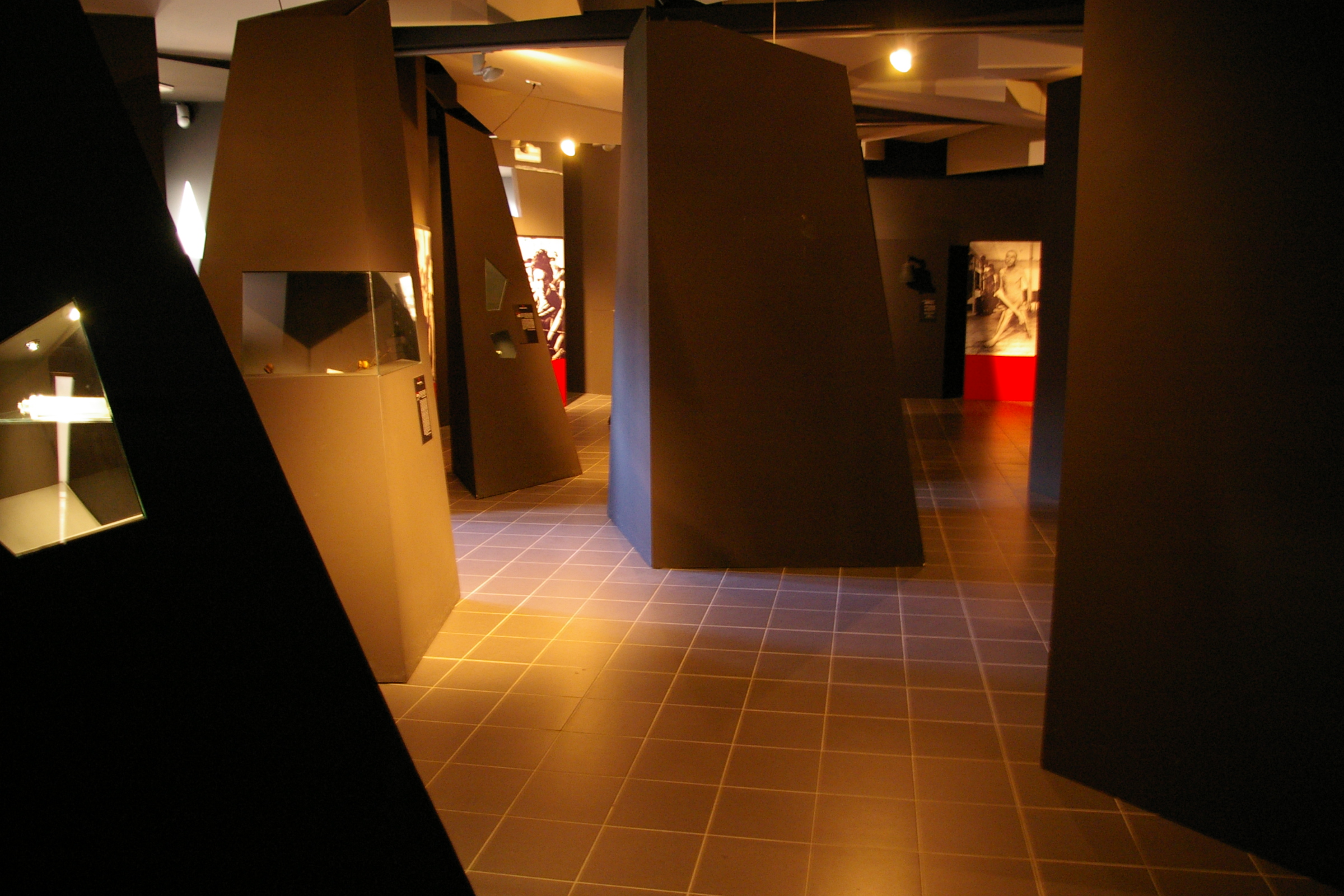 Museo della Deportazione e Resistenza di Prato